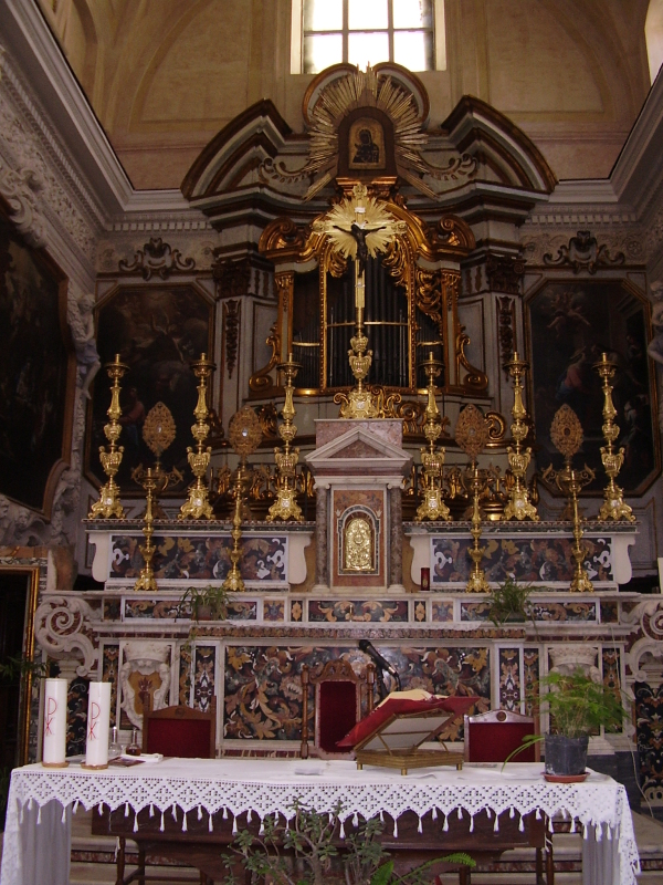 Altare maggiore della chiesa di Santa Maria della Verità, altresì conosciuta come chiesa di Sant'Agostino degli Scalzi, Napoli